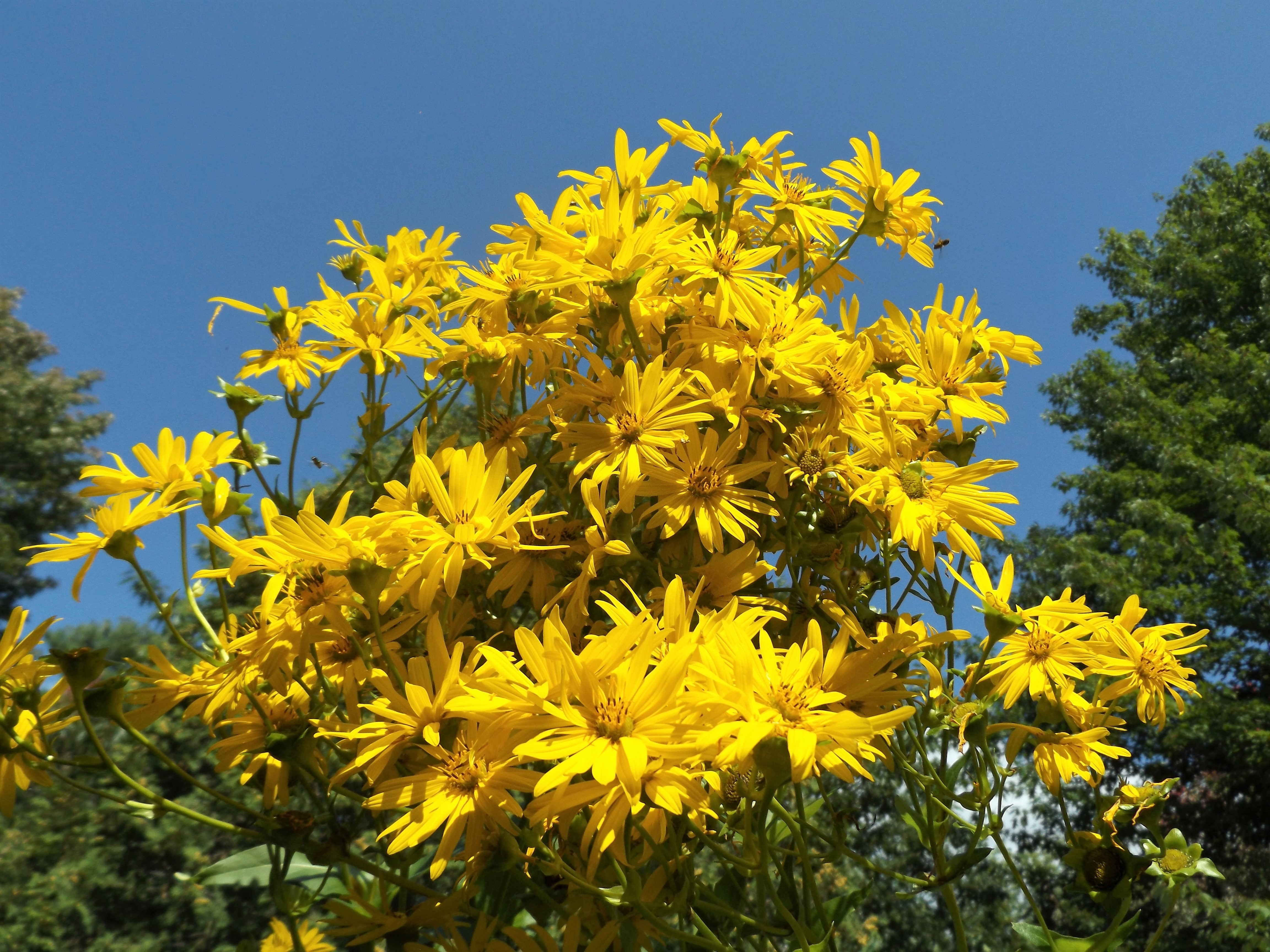 Bouquet de Silphium perfoliatum à plus de 2 m du sol, en pleine terre, sud du Québec.